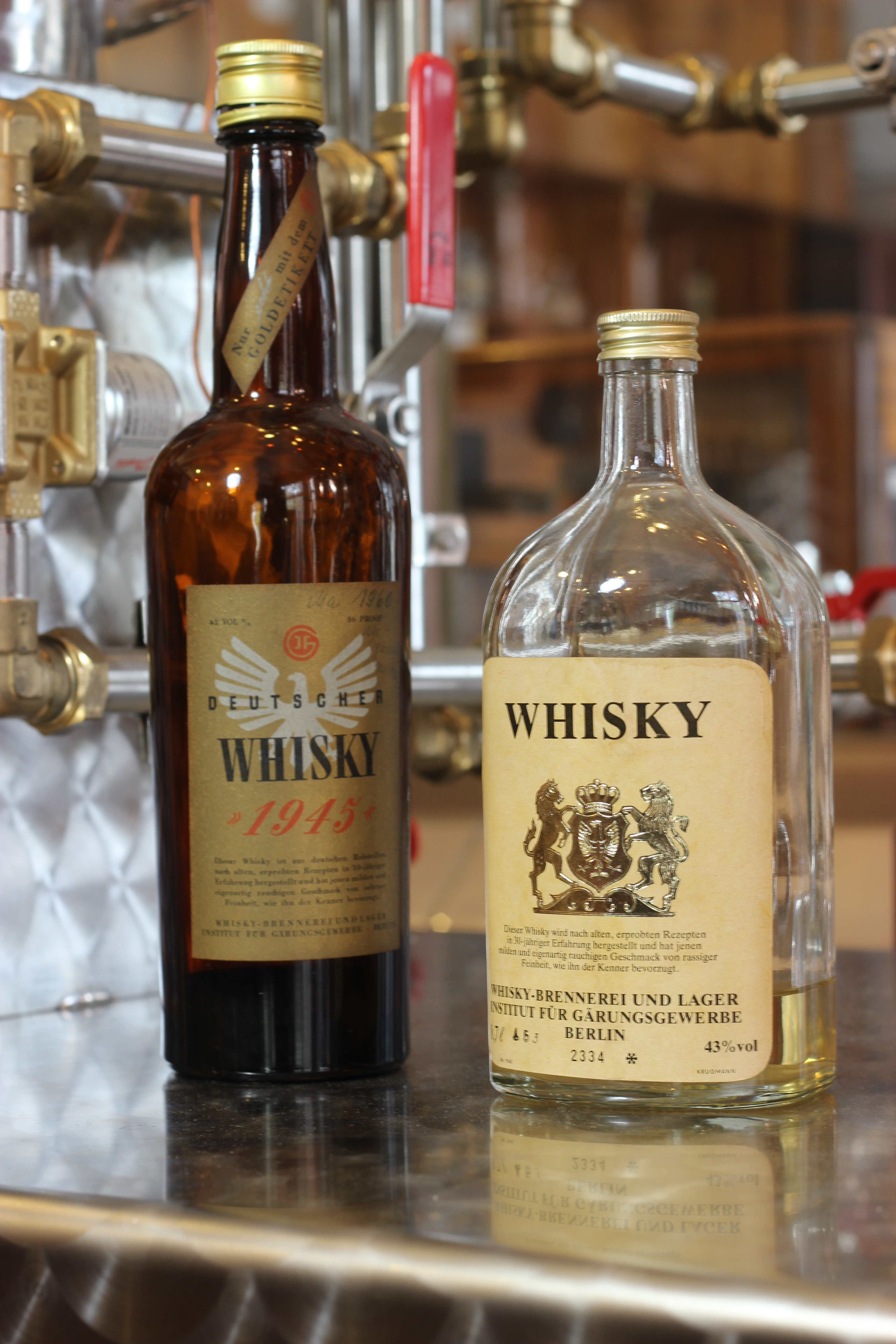 Whisky "1945" und "Whisky" hergestellt auf dem Institut für Gärungsgewerbe Berlin.